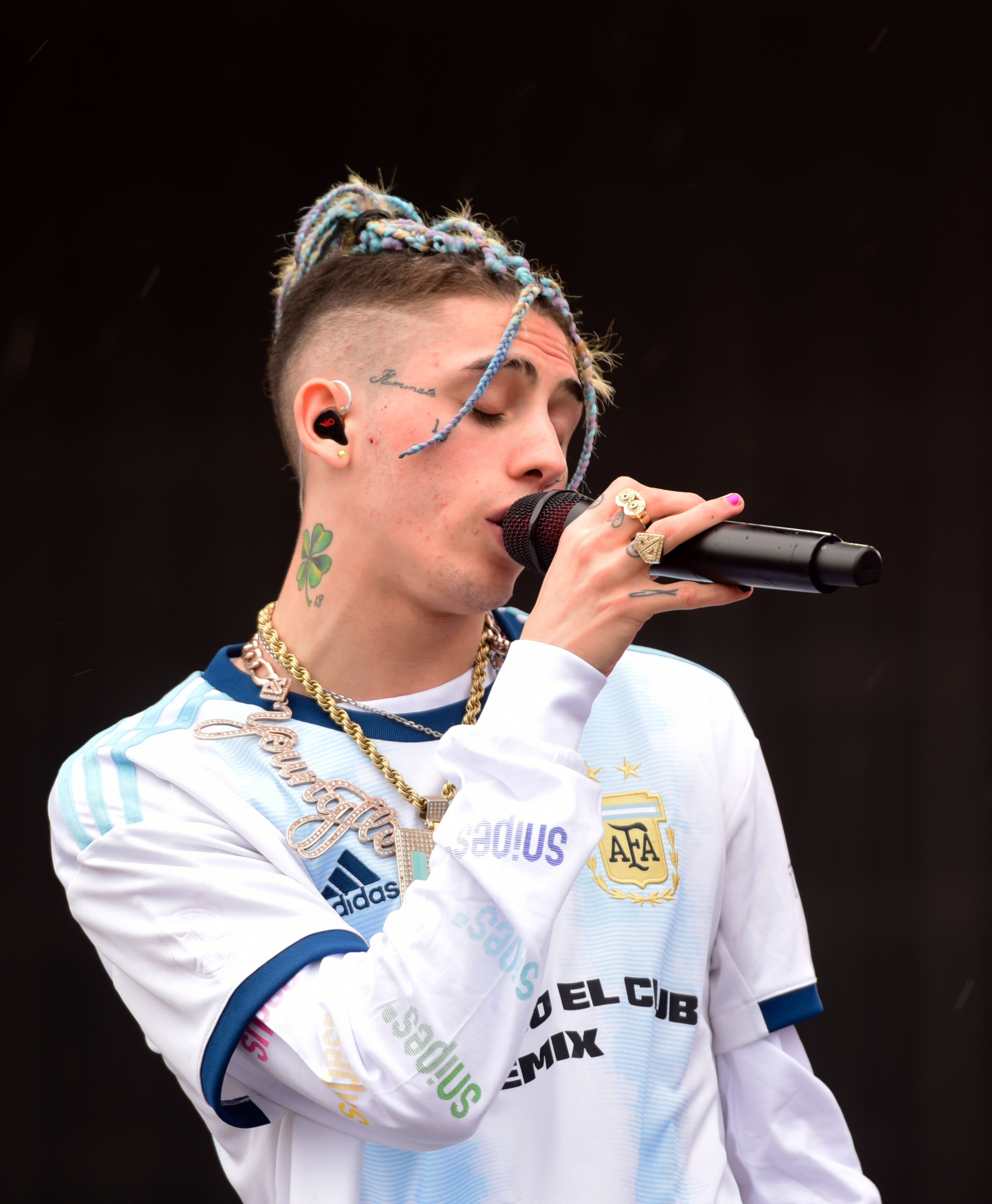 Khea live auf dem Openair Frauenfeld 2019